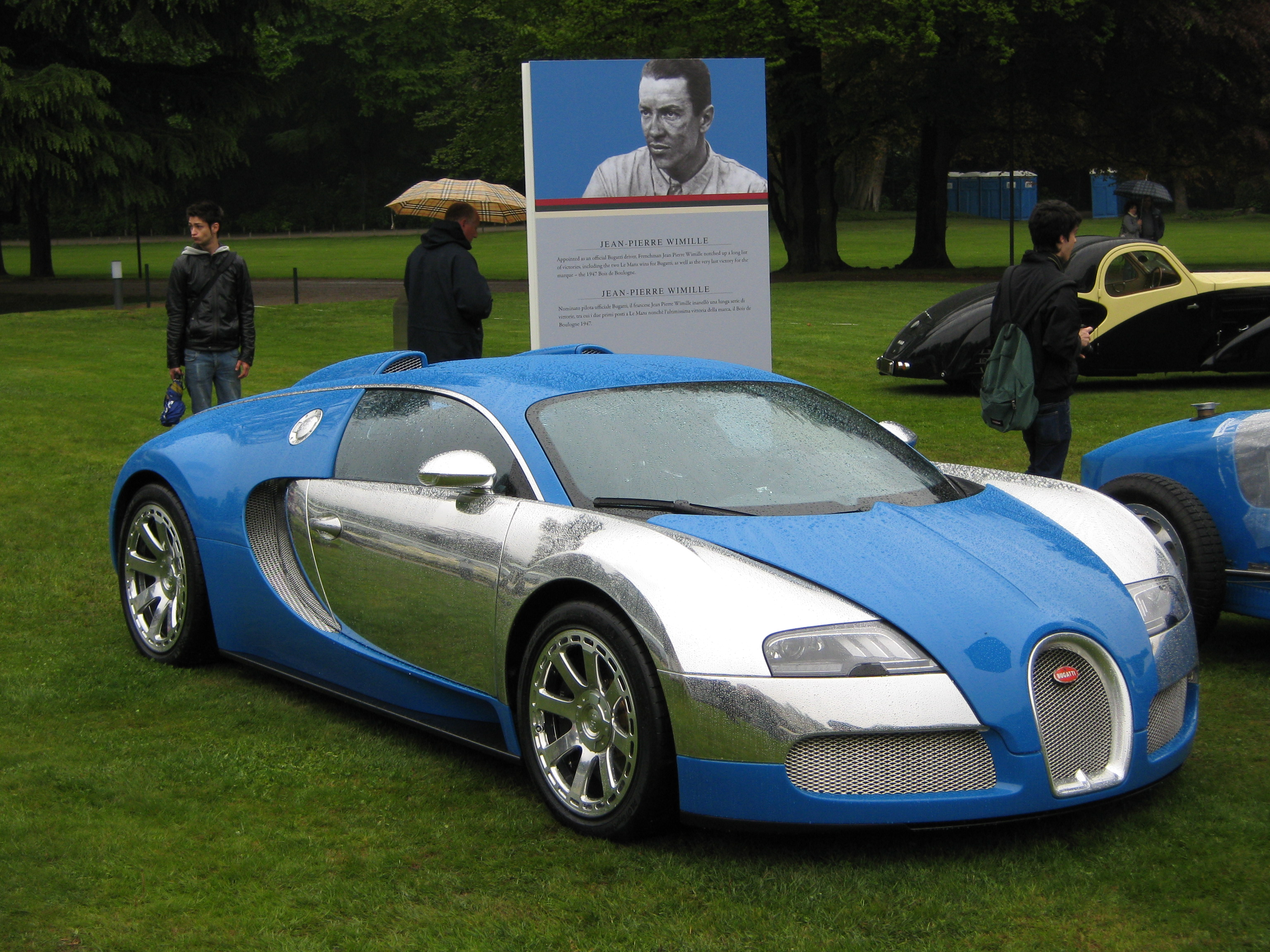 La Bugatti Veyron, esemplare unico dedicato a Wimille e caratterizzato da una bicromia argento - blu. La vettura, costruita per celebrare i 100 anni della Bugatti, era esposta, in anteprima mondiale, il 26 aprile 2009 al concorso di eleganza "Villa d'Este" di Cernobbio (Como, Italia) assieme ad altri tre esemplari unici dedicati ad altrettanti piloti che hanno fatto la storia della casa automobilistica (Achille Varzi, Malcolm Campbell e Hermann Zu Leiningen).